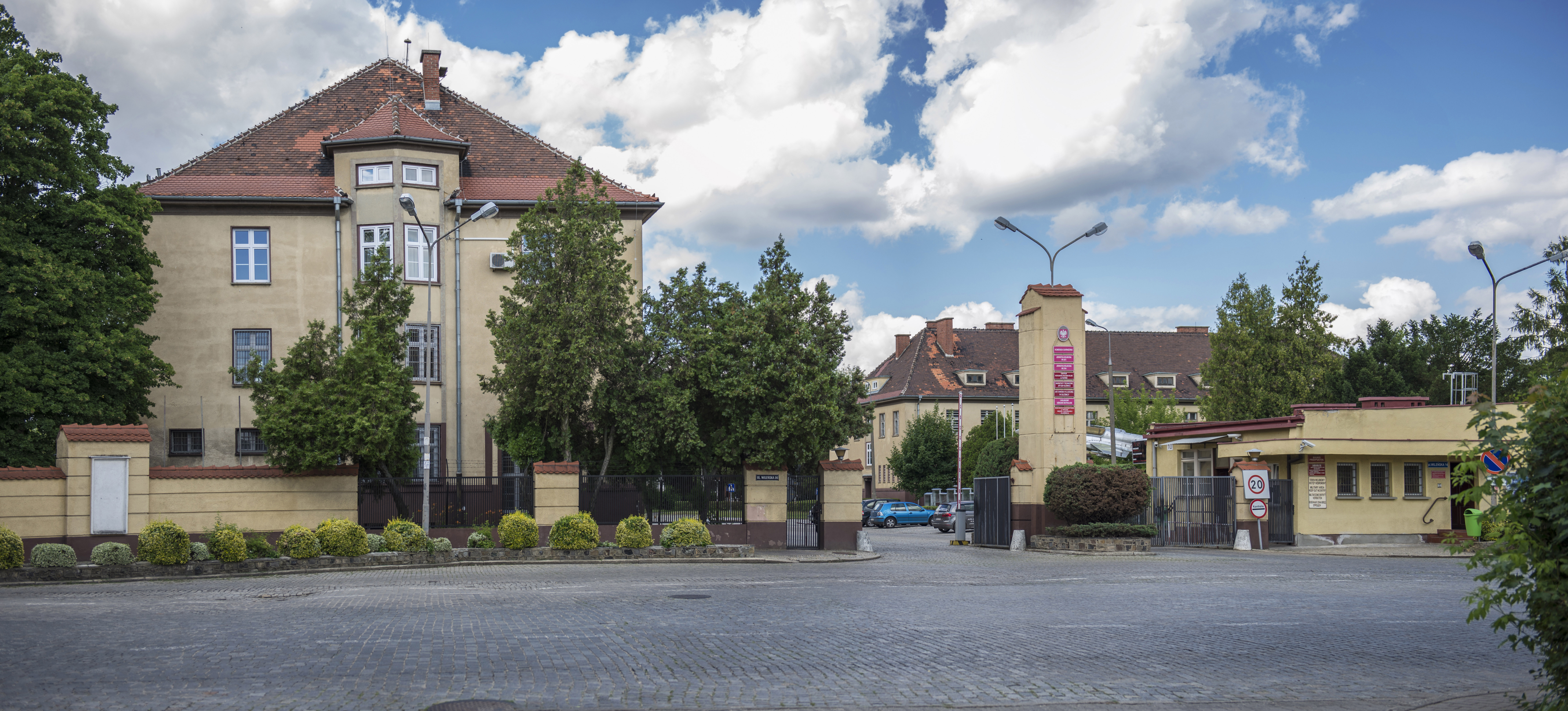 Jednostka Wojskowa "Białe Koszary"